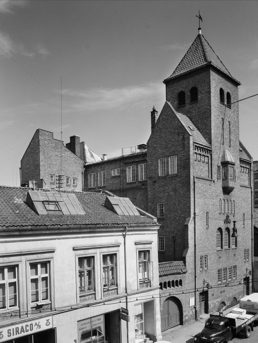 Piperviken småkirke (Pipervikskirken) var en kirke som lå i Munkedamsveien 12. Den ble oppført som en distriktskirke til Johannes kirke og revet i 1959 etter at de store reguleringsplanene for Vika ble igangsatt. Kirken var tegnet av arkitiekt Harald Aars som fikk Houens fonds diplom i 1923 for sitt arbeide.